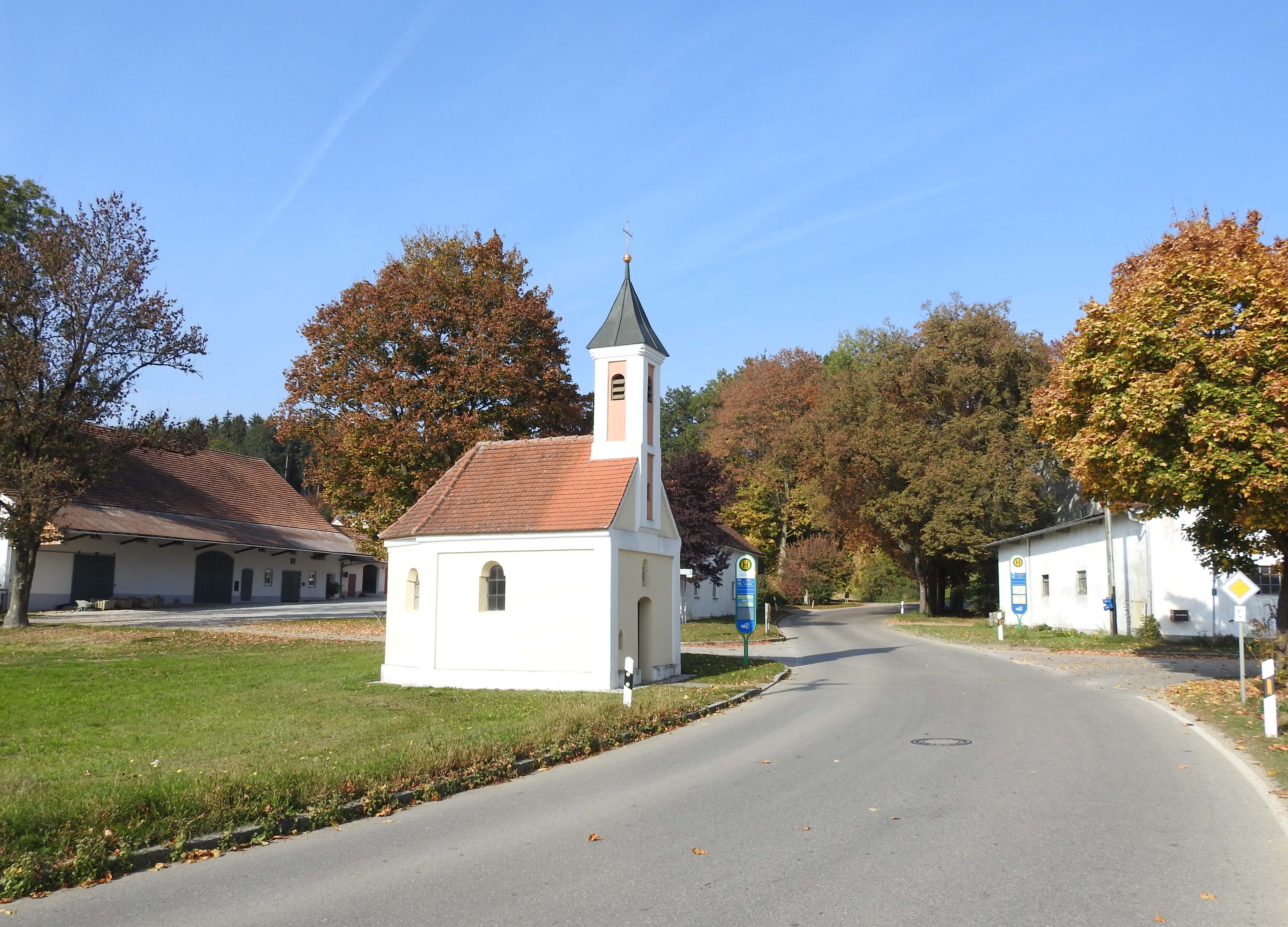 Kapelle in Oberndorf, Altomünster